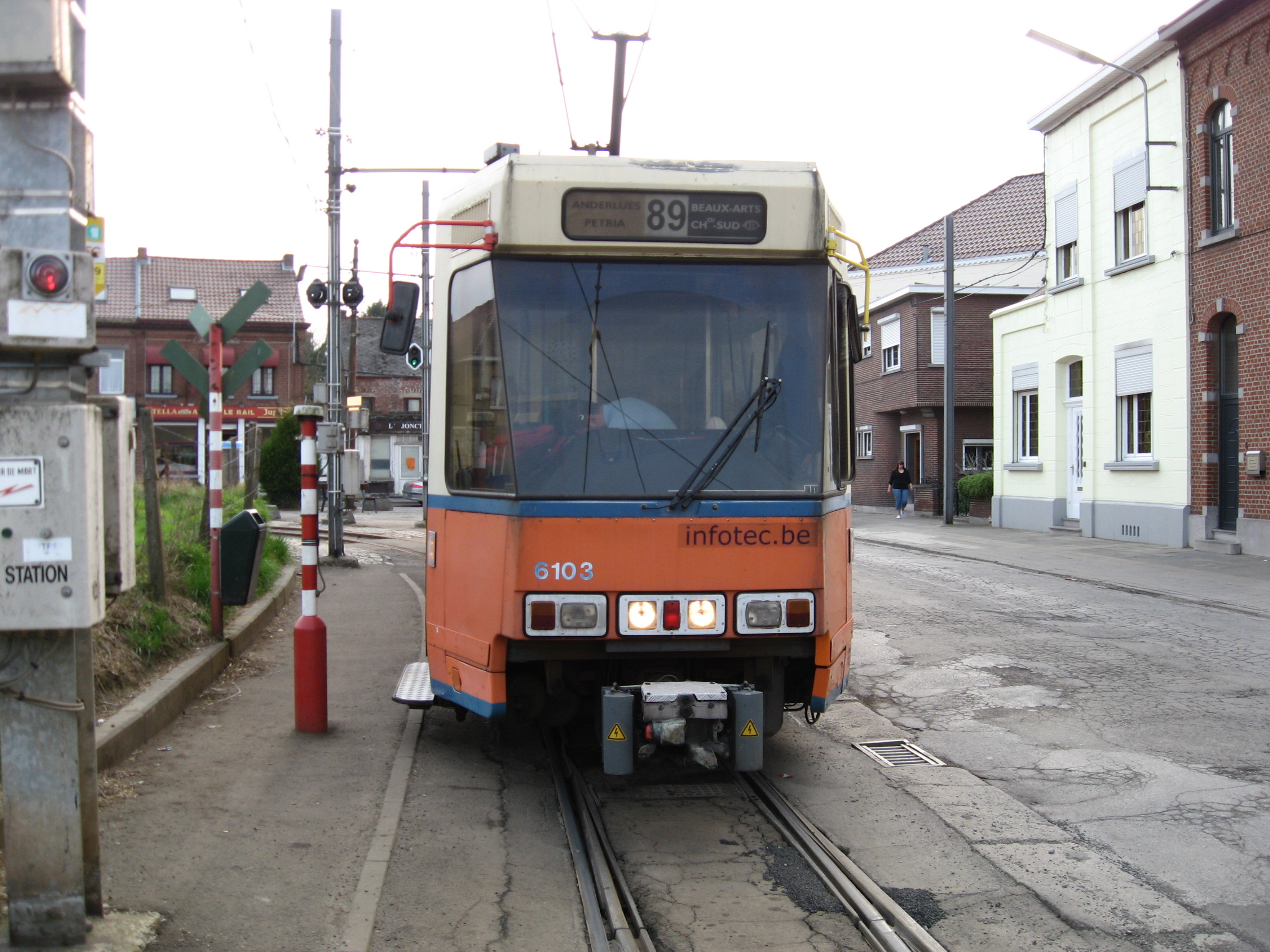 Tram TEC in Anderlues bij de stelplaats